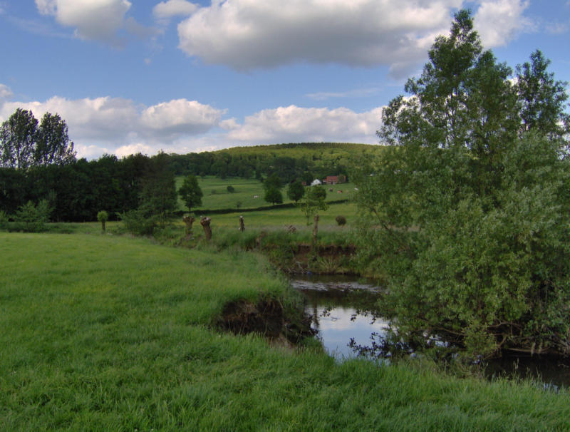 Epen, Limburg, nl:4 juni nl:2006, Eigen Werk